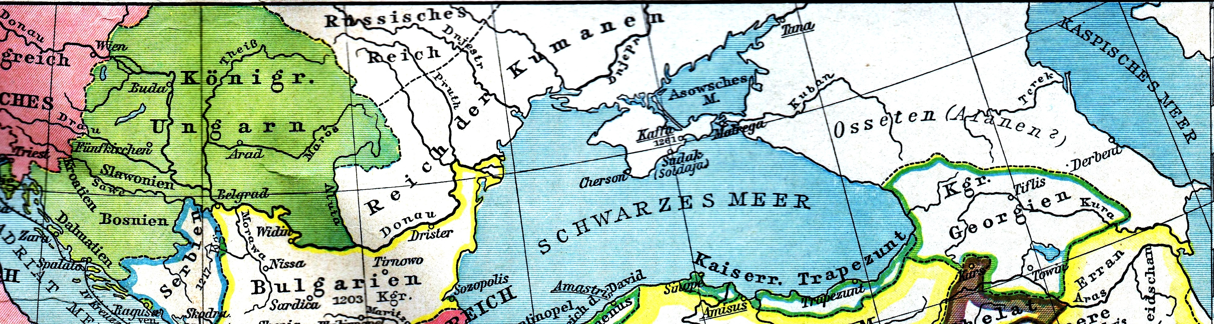 Europa sudică după cea de-A Patra Cruciadă (1204).